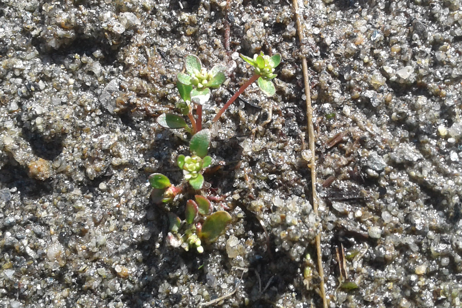 Поспелов И. Н. Фотография живых растений образца MW0163518 из коллекции "Гербарий МГУ" // Депозитарий живых систем "Ноев Ковчег" (направление "Растения"): Электронный ресурс. – М.: МГУ, 2018. – Режим доступа: (дата обращения 30.12.2018). – Лицензия CC-BY 4.0.